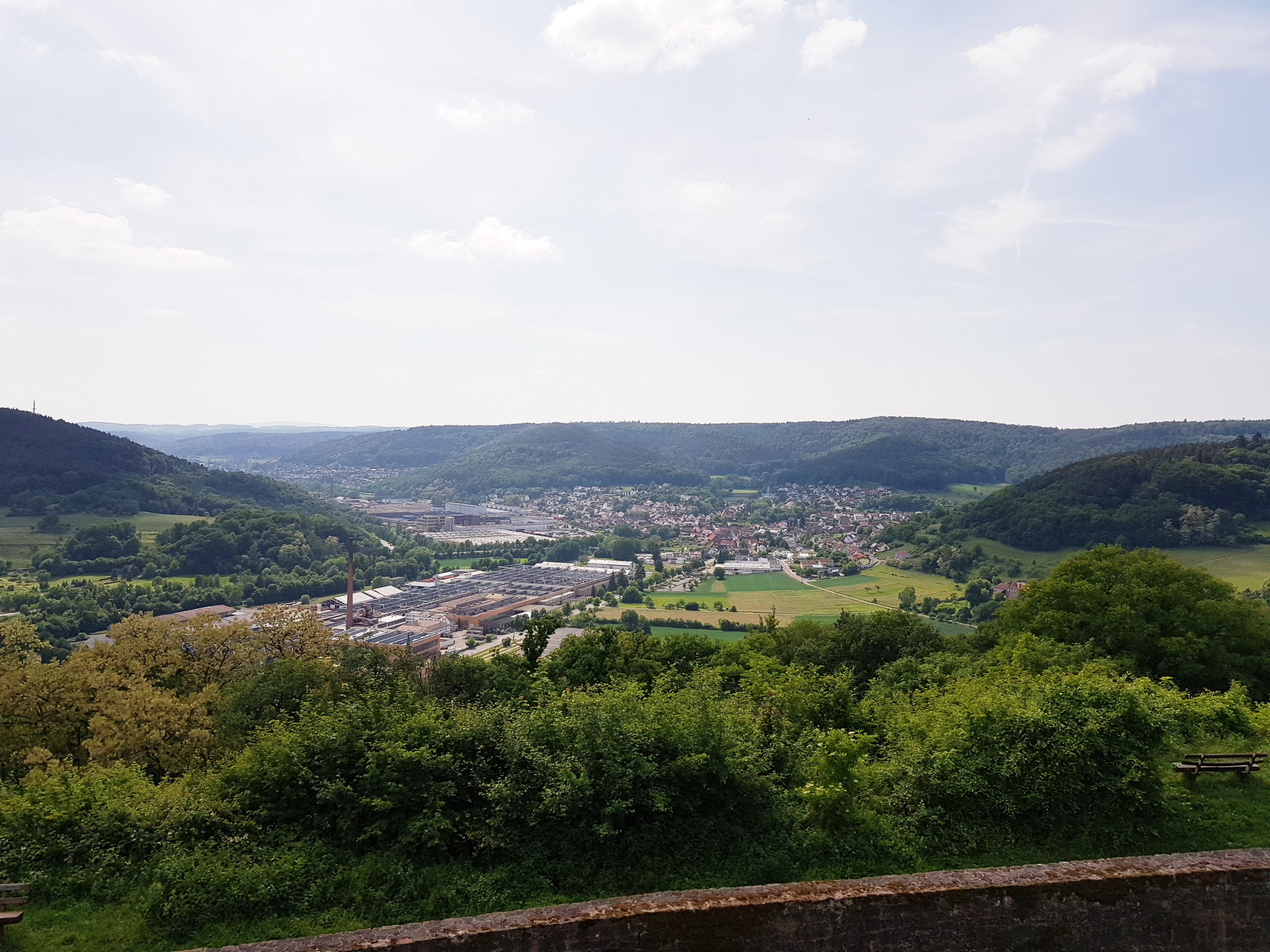 Sandbach von Burg Breuberg aus gesehen im Mai 2018